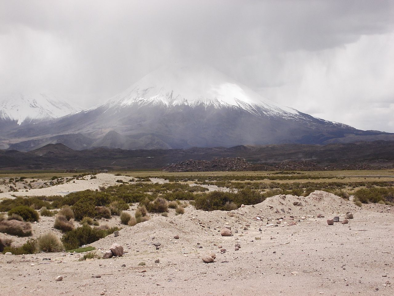 Foto tirada por mim, em Arica.